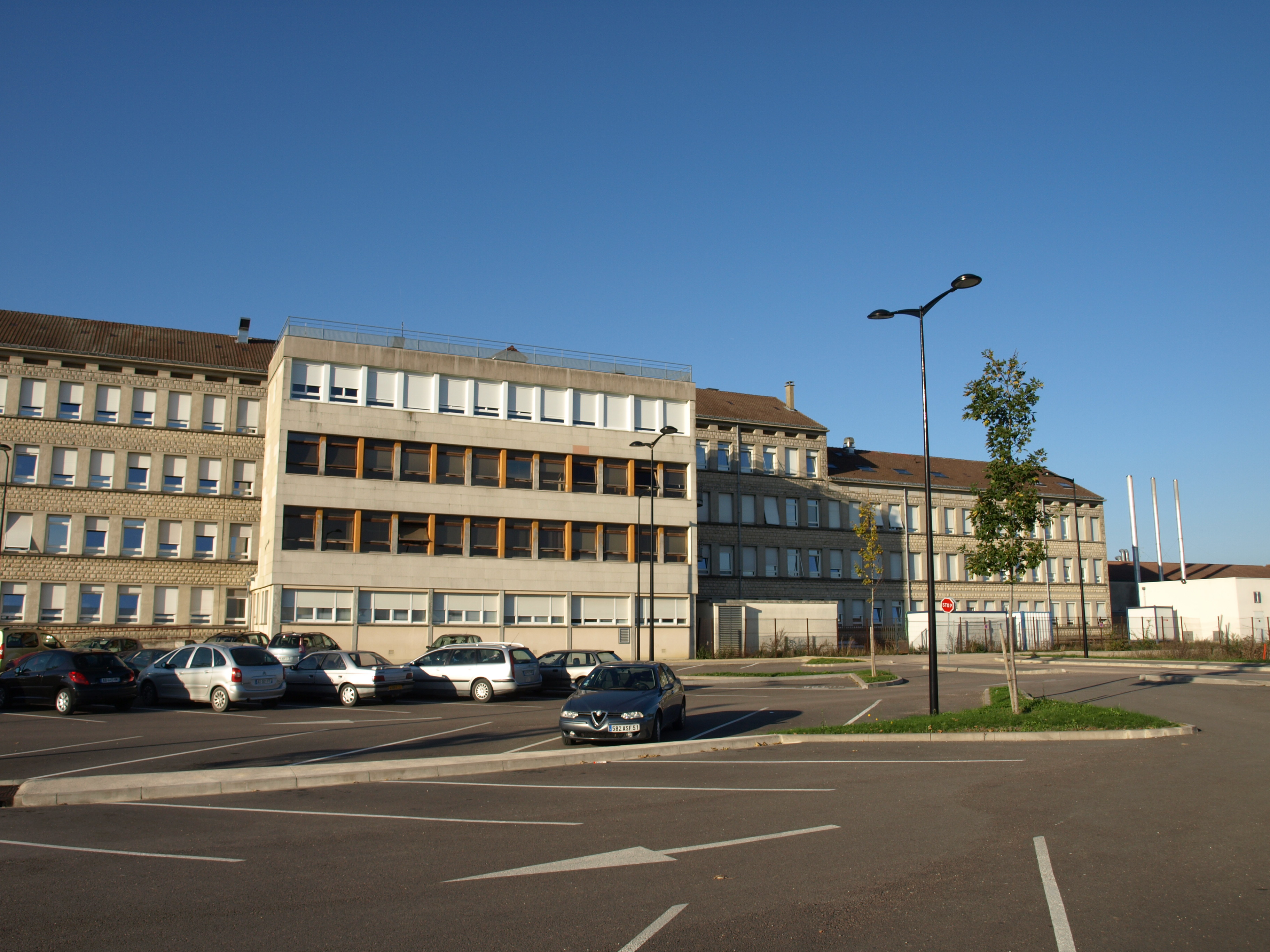 Vitry-le-François (51300 - FRANCE) : photographies Hôpital général.